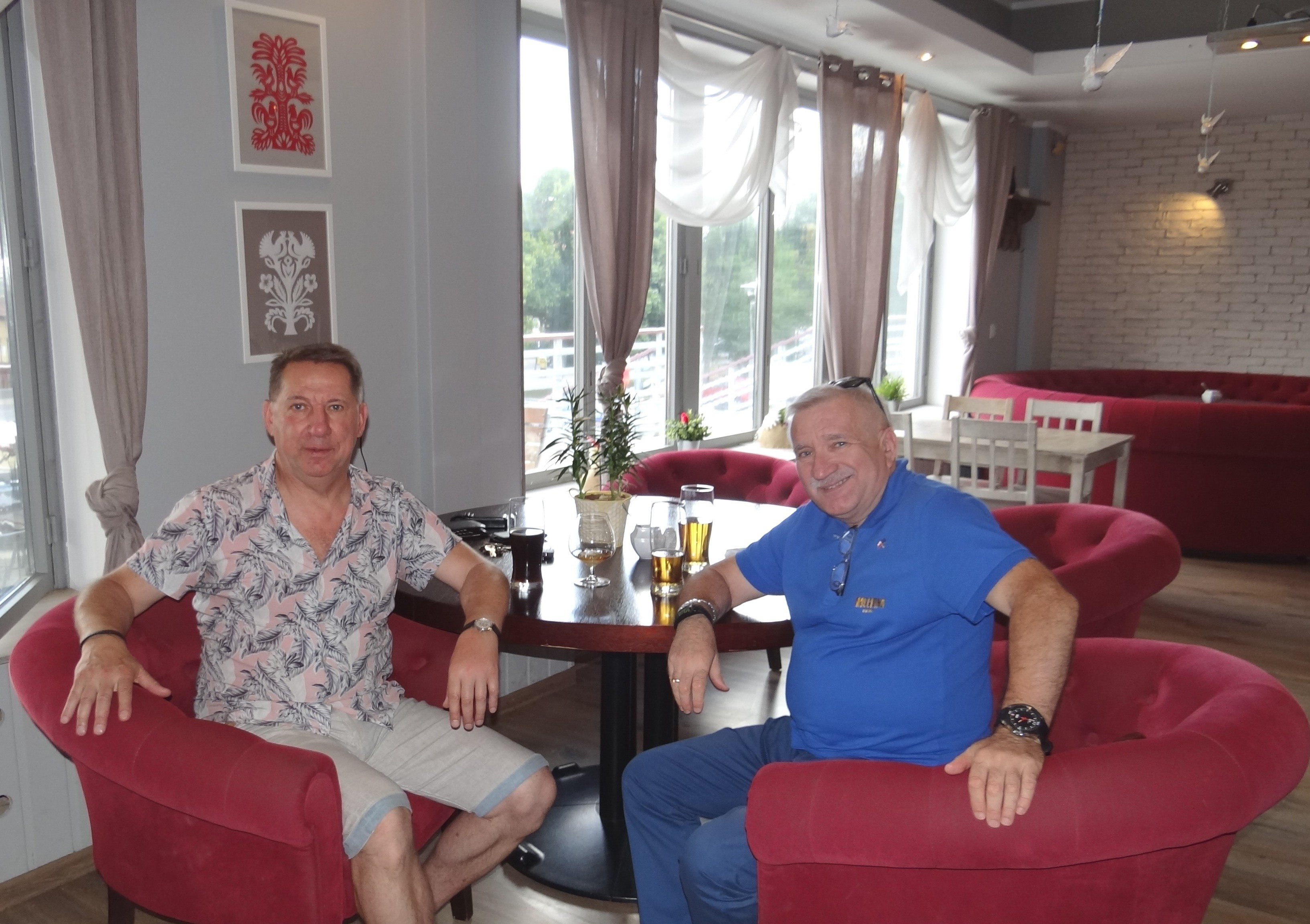 Krzysztof Koziorowicz i redaktor wikipedii Keres 40 02.07.2018